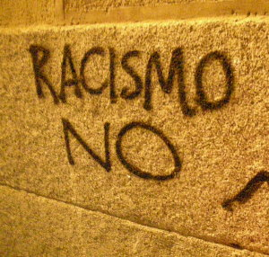 no racismo graffiti